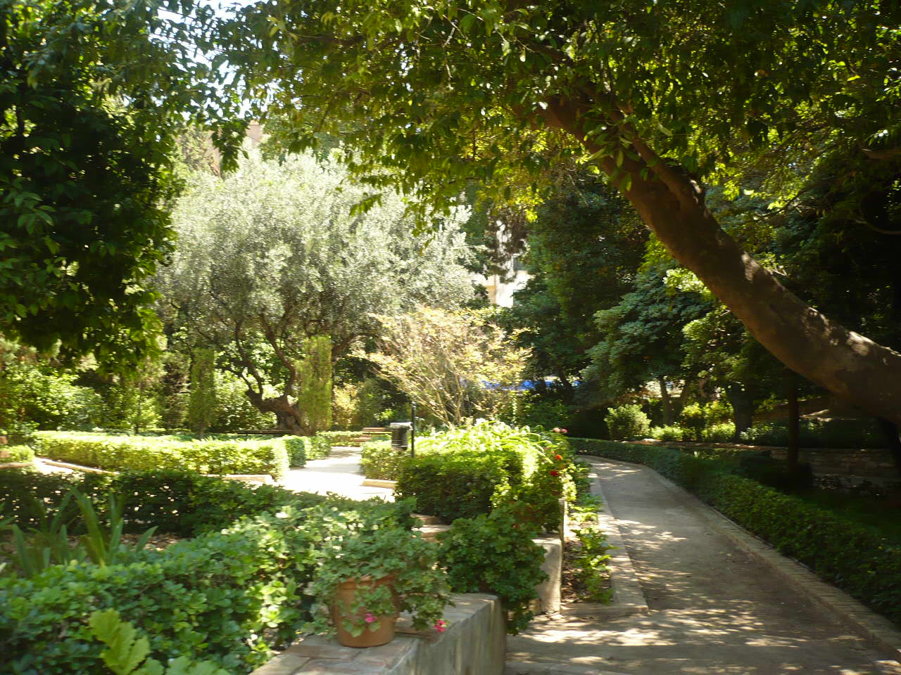 Jardin Monforte en Valencia